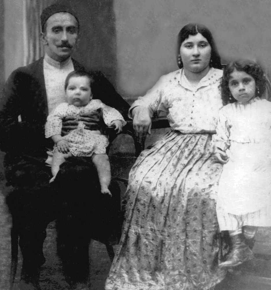 Cabbar Qaryağdıoğlu ailəsi ilə birlikdə